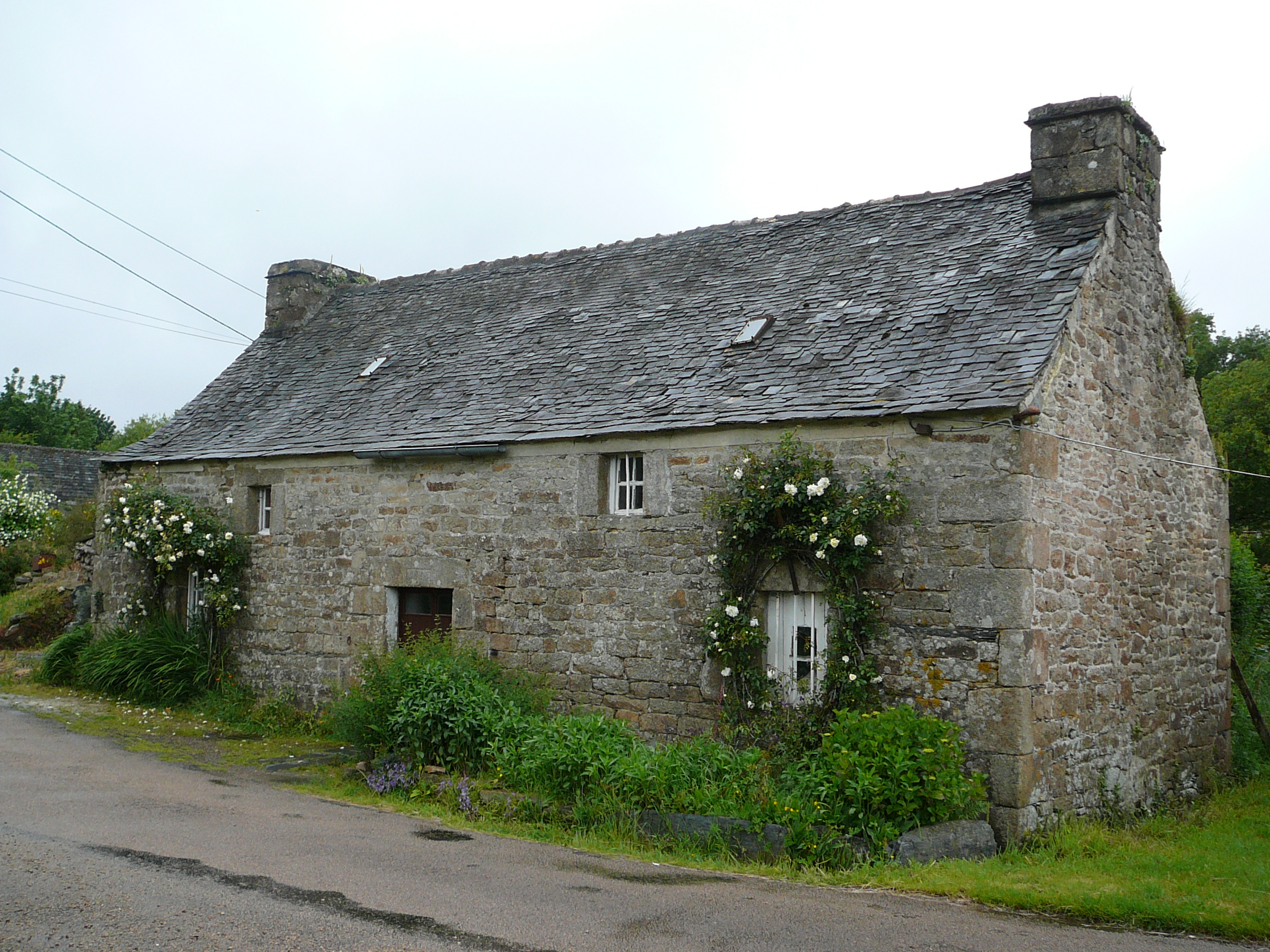 Longère typique de l'habitait du XXème siècle dans les Monts d'Arrée